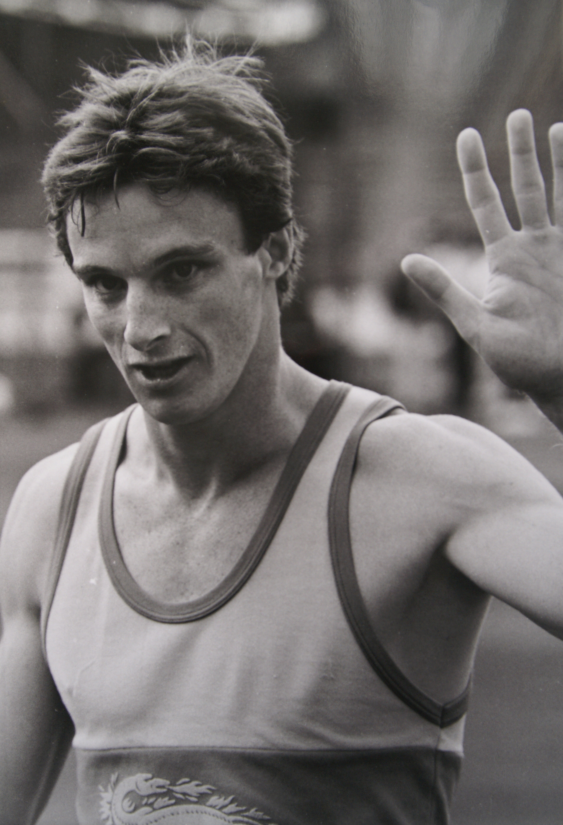 doublé 100 et 200 mètres